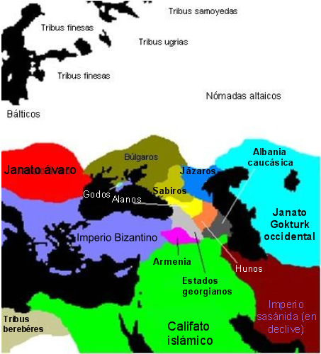 Mapa con la localización de los alanos 650 d.C. Pueblos que rodeaban el Mar Negro